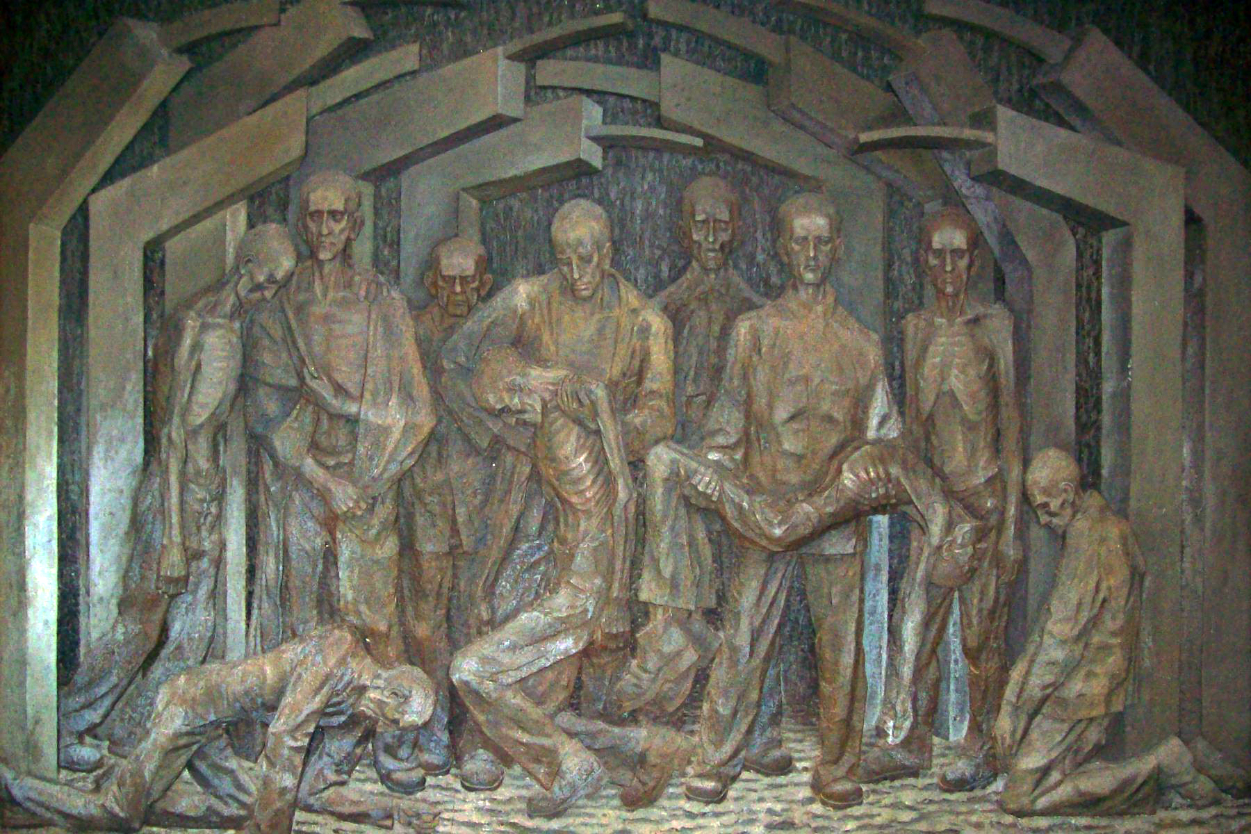 Rzeźba upamiętniająca ofiary Gross-Rosen